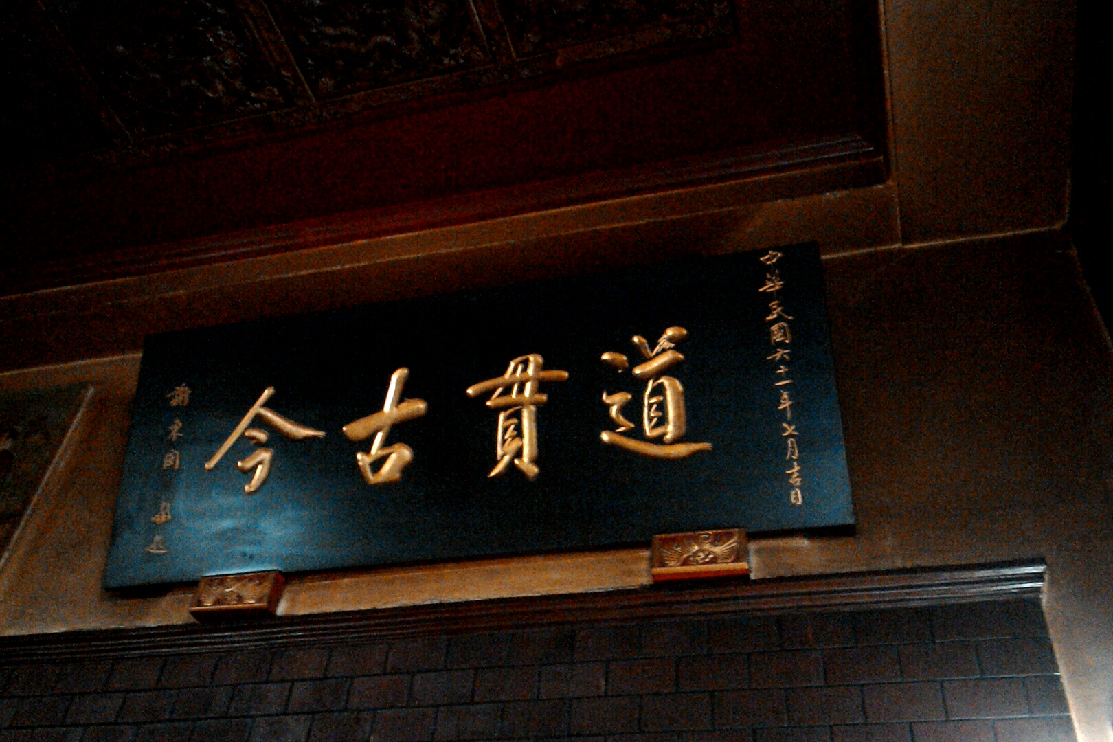 桃園文昌宮台灣省主席謝東閔贈匾,桃園市桃園區市中次分區文昌里